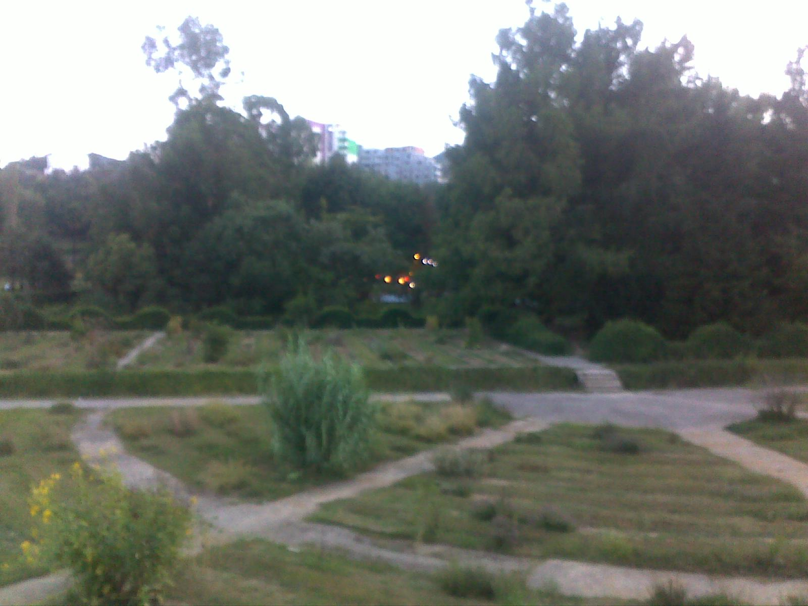 Kopshti Botanik 2014